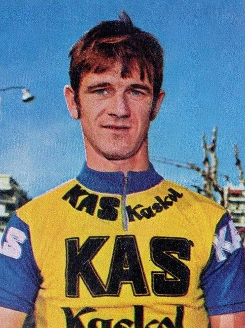 CAMPIONI dello SPORT 1973/74-Figurina n.172- PERURENA -CICLISMO-Rec